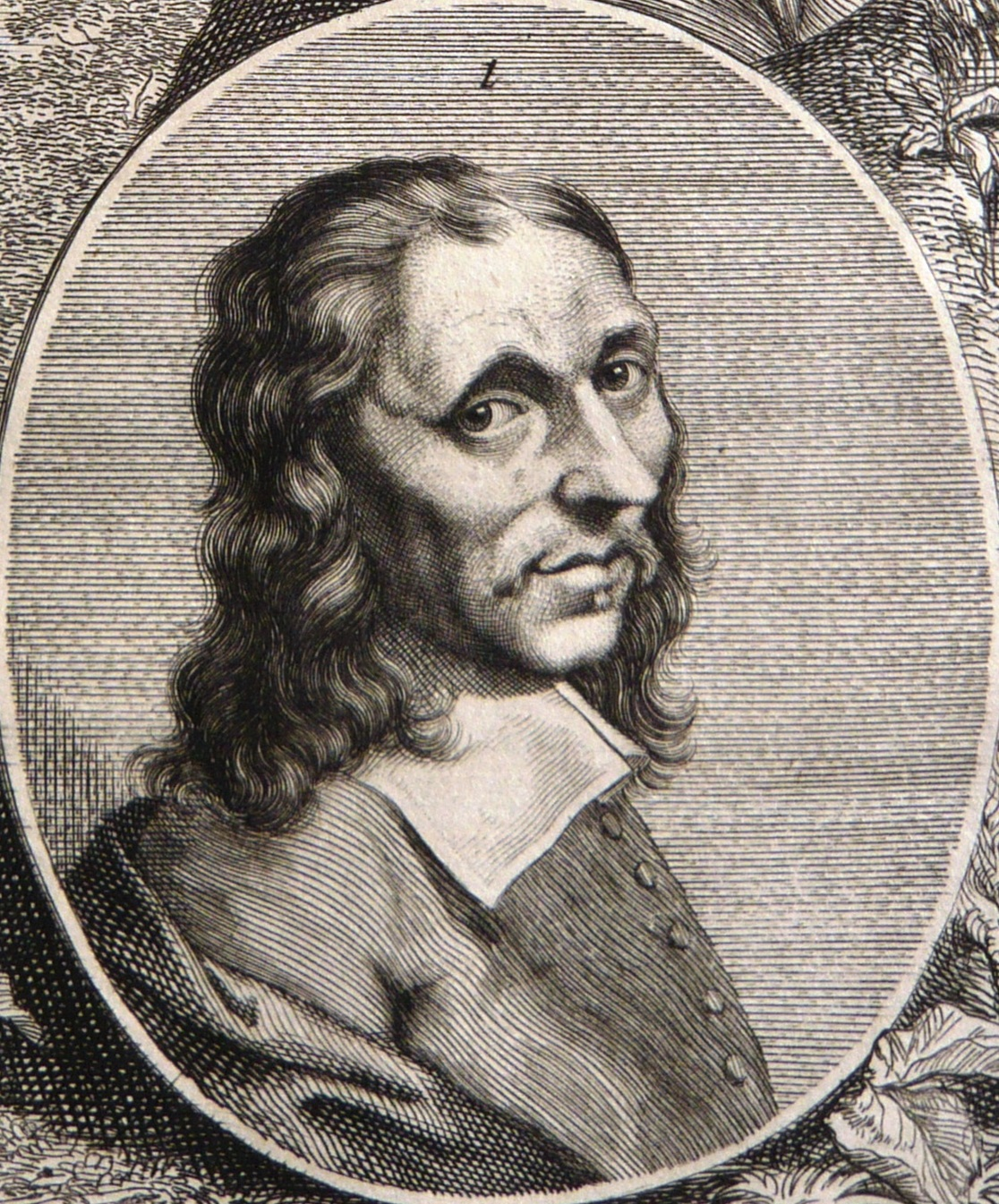 Portret van Allaert van Everdingen